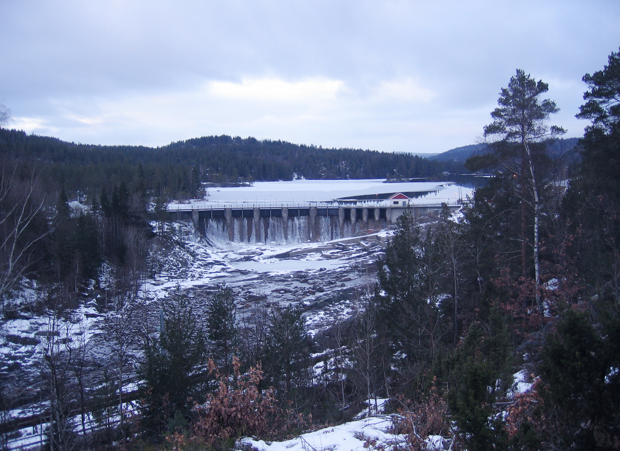 Nidelva - Haugsjådammen ved Bøylefoss kraftstasjon